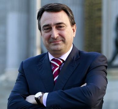 Aitor Esteban posant devant les lions du Congrès des députés en février 2016.